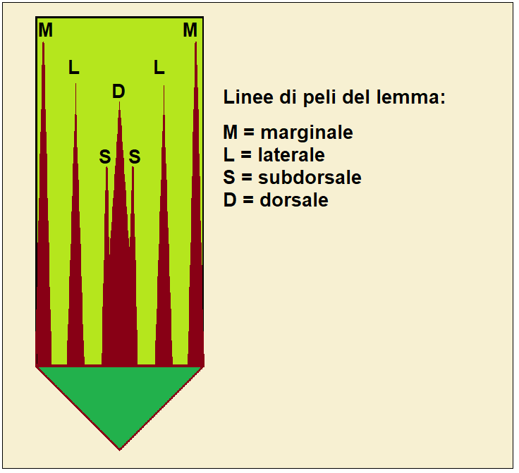 Stipa pennata - Linee dei peli del lemma